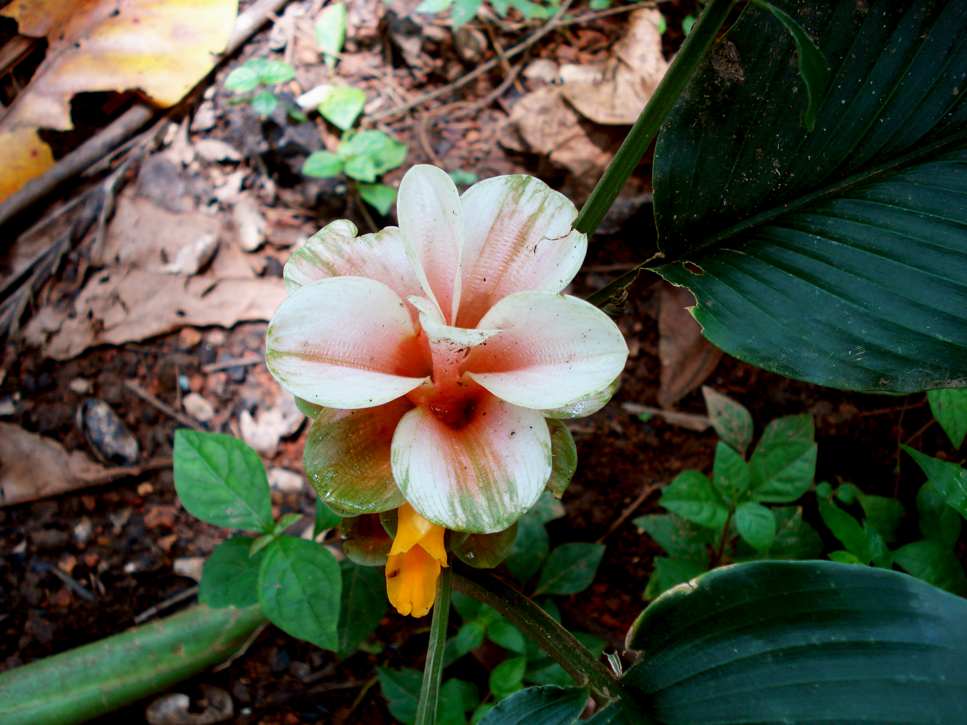 മഞ്ഞൾ-പൂവ്